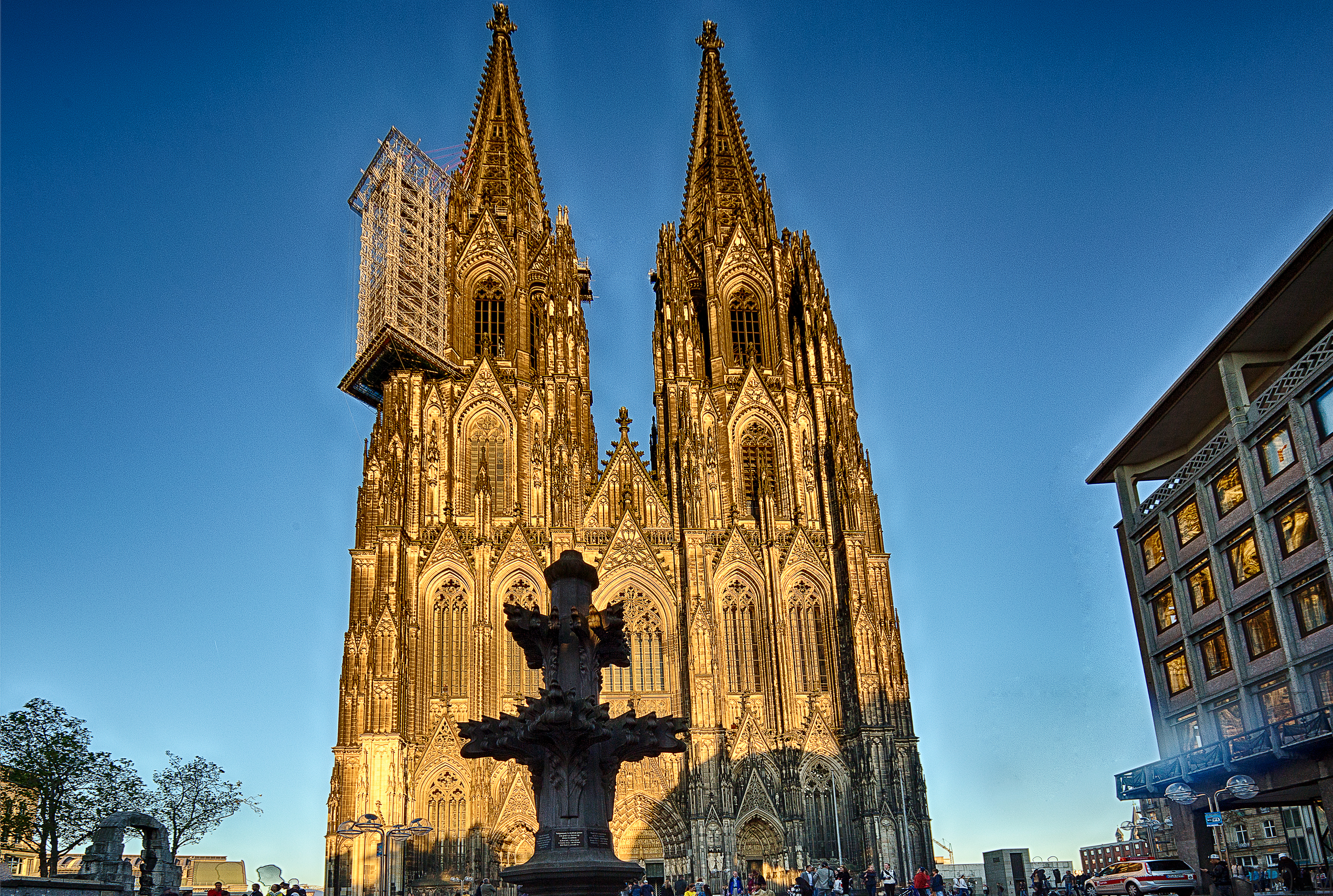 Kölner Dom mit DomroseThis is a photograph of an architectural monument. Dom